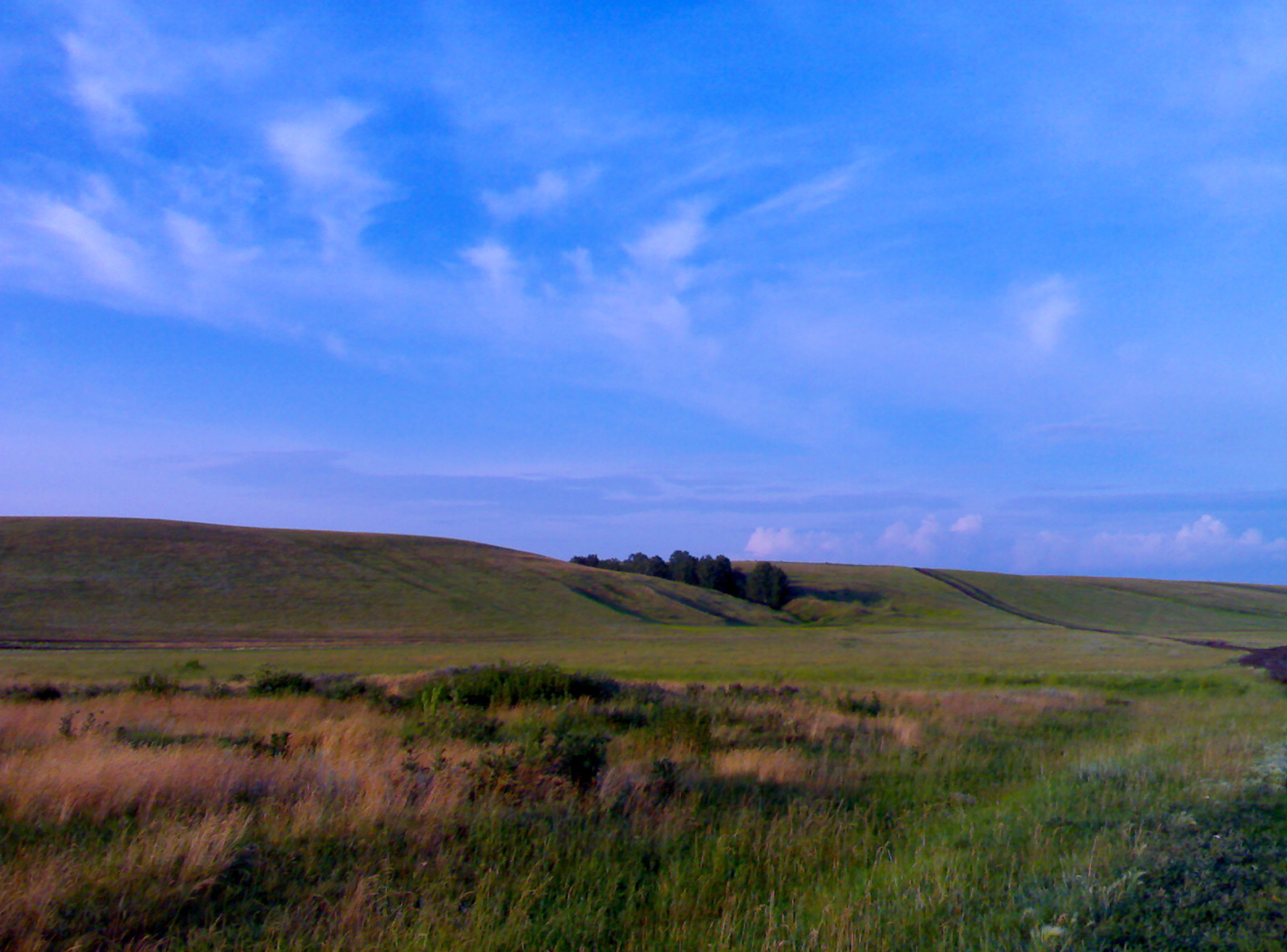 Холмы рядом с селом Афонькино